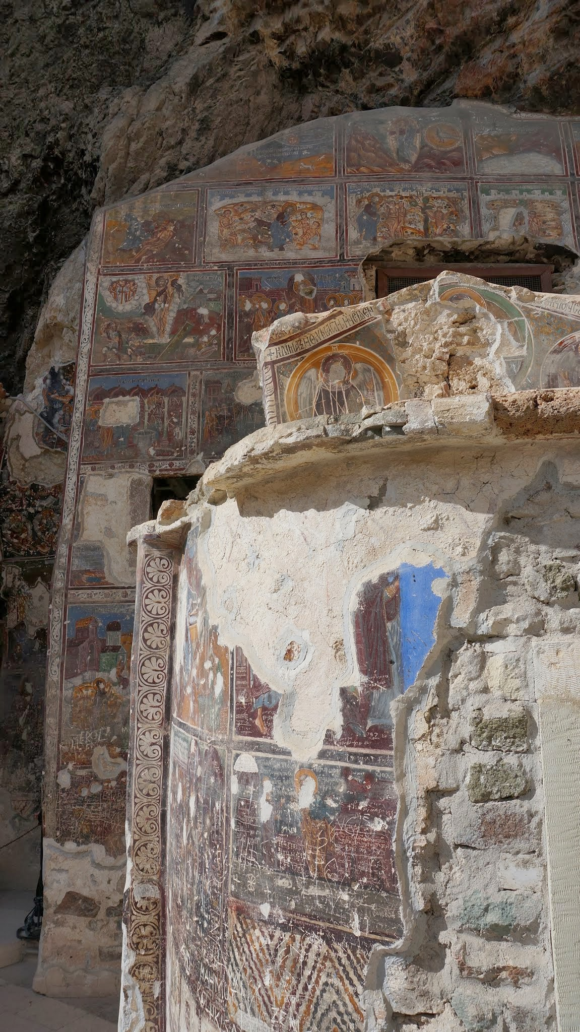 61750 Altındere/Maçka/Trabzon, Turkey